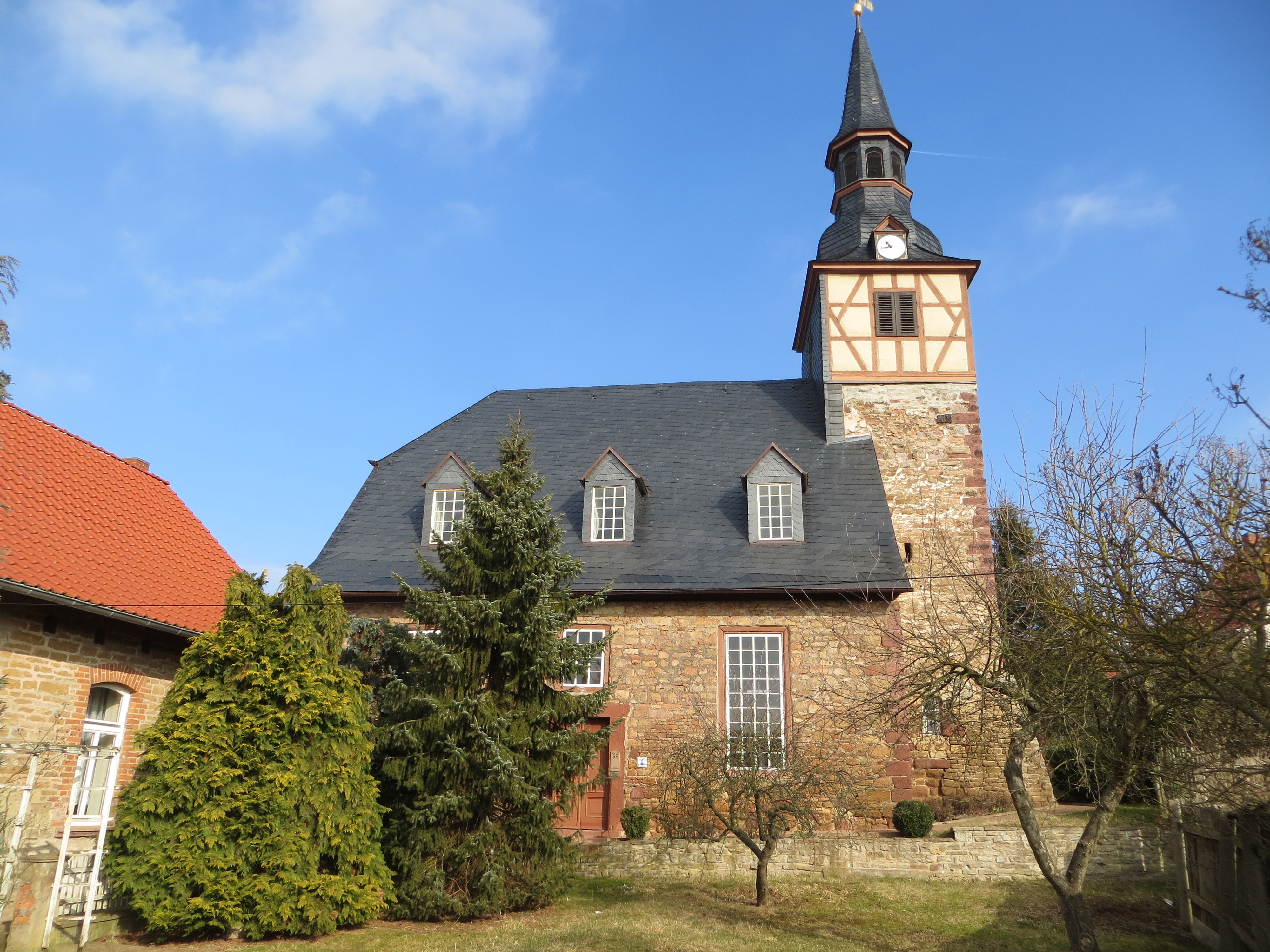 Rosperwenda, St. Margaretha Kirche, links die alte SchuleThis is a photograph of an architectural monument. 84247